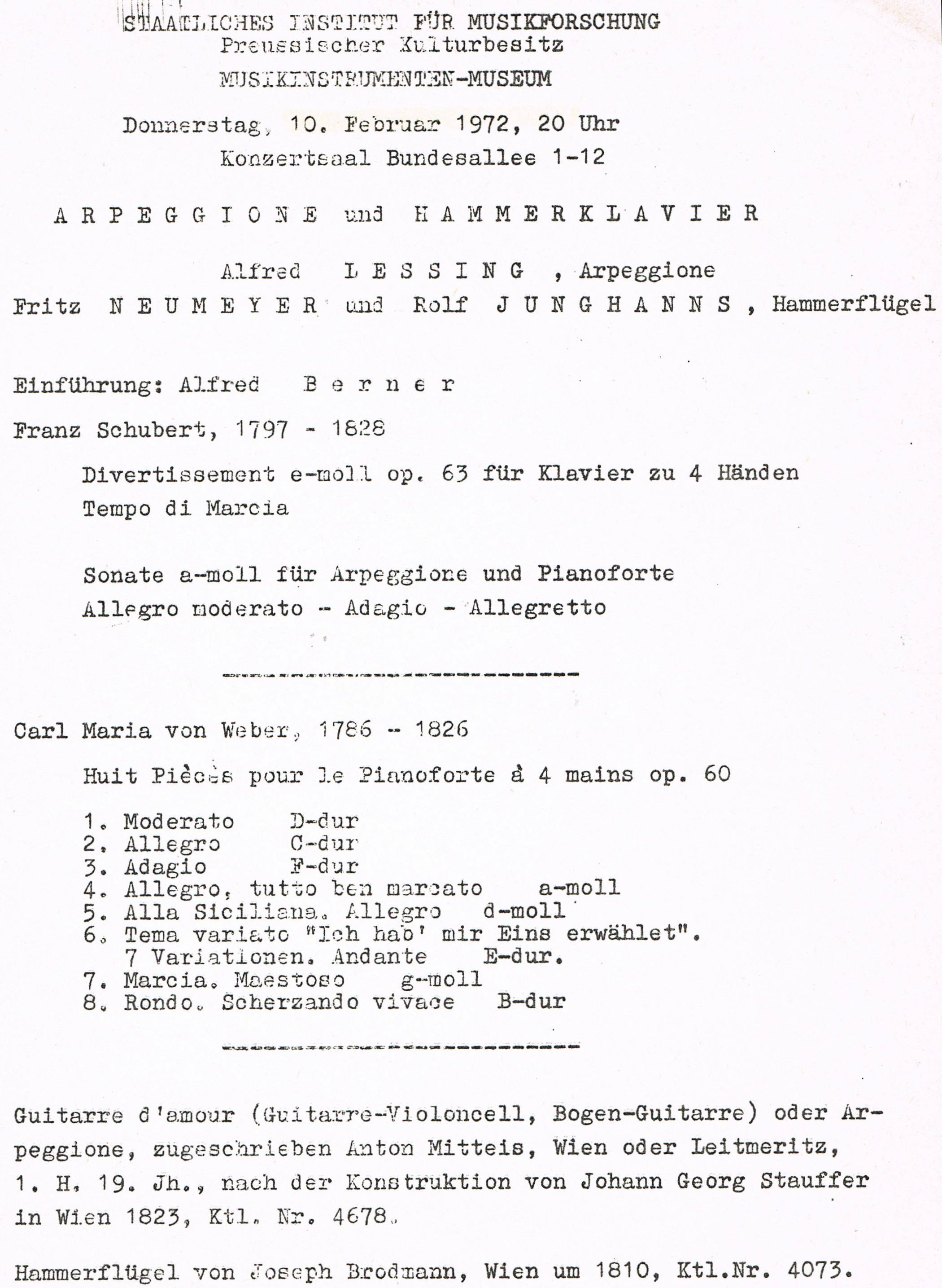 Konzertprogramm 10.02.1972, Aufführung im Musikinstrumentenmuseums Berlin mit Alfred Lessing, Rolf Junghanns und Fritz Neumeyer, Werke von Franz Schubert